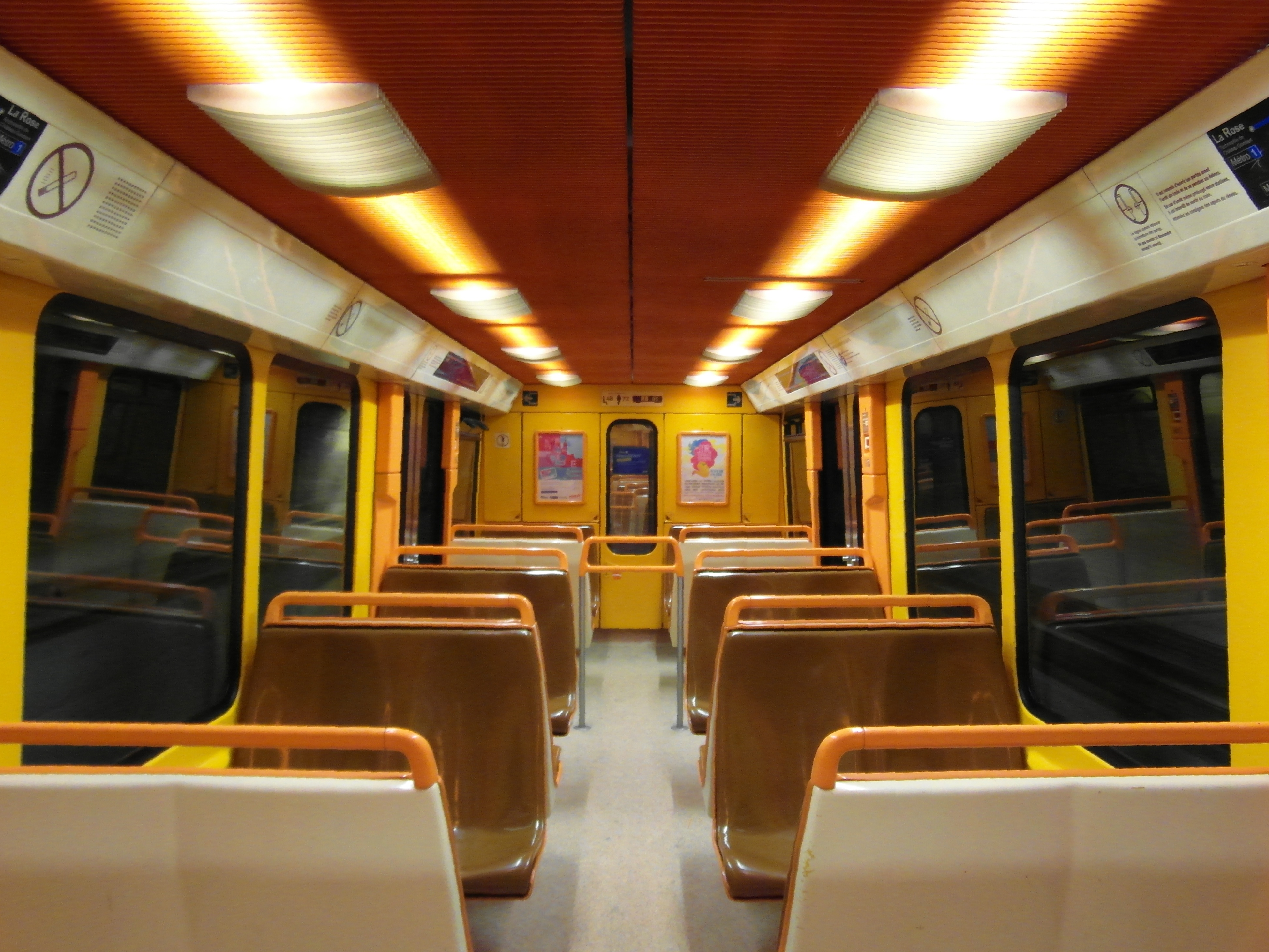 Marseille - Inside Metro